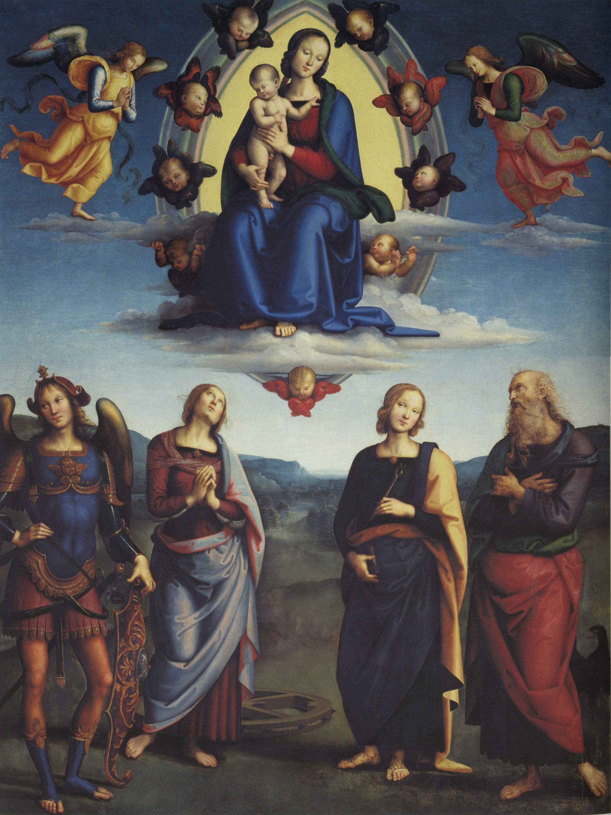 Pietro Perugino: Madonna in gloria col Bambino tra angeli e i Santi Michele Arcangelo, Caterina d’Alessandria, Apollonia, Giovanni Evangelista Cat. no. 59 in Vittoria Garibaldi: Perugino. Catalogo completo. Octavo, Firenze 2000, ISBN 88-8030-091-1